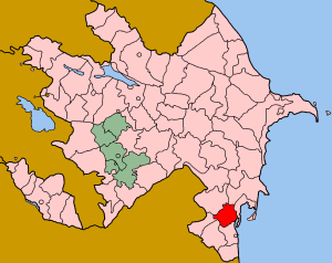 Map of Azerbaijan showing Masally (Masallı) rayon.